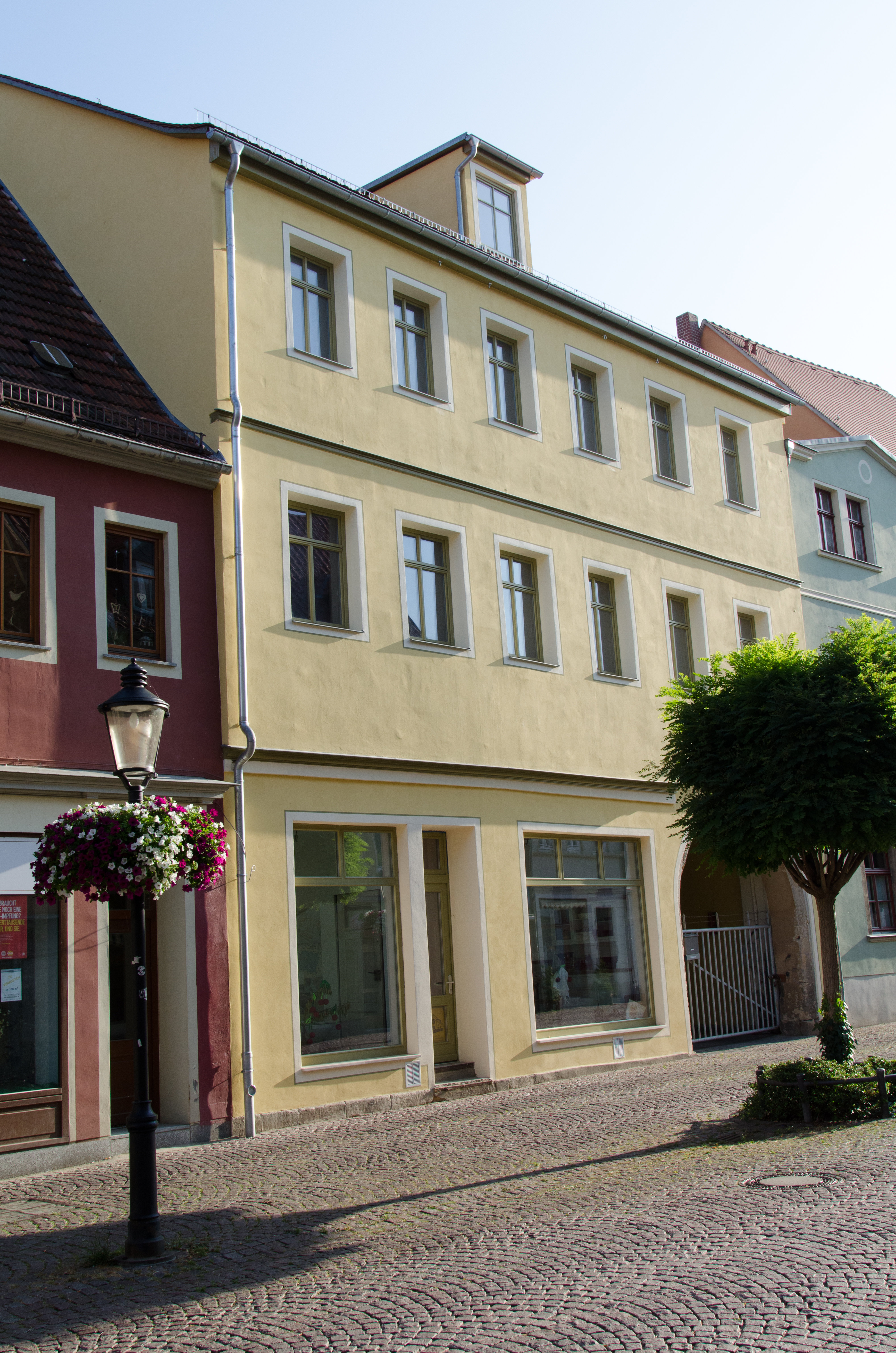 Naumburg, Salzstraße 27